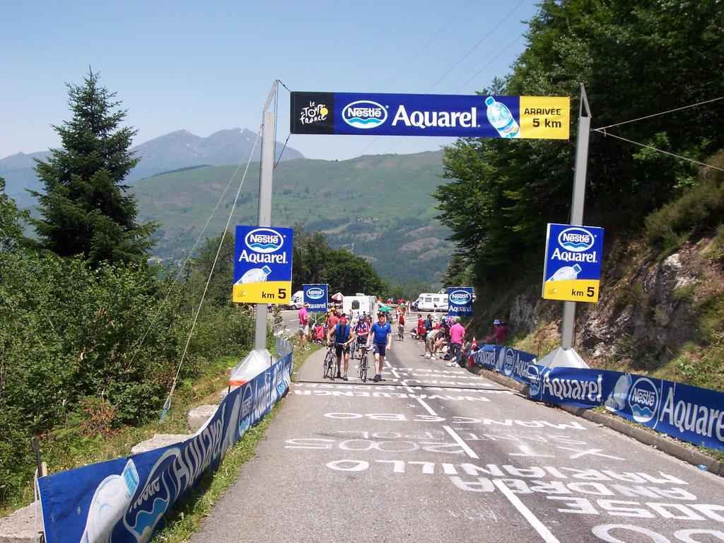 Ax3 Domaines during w:2005 Tour de France